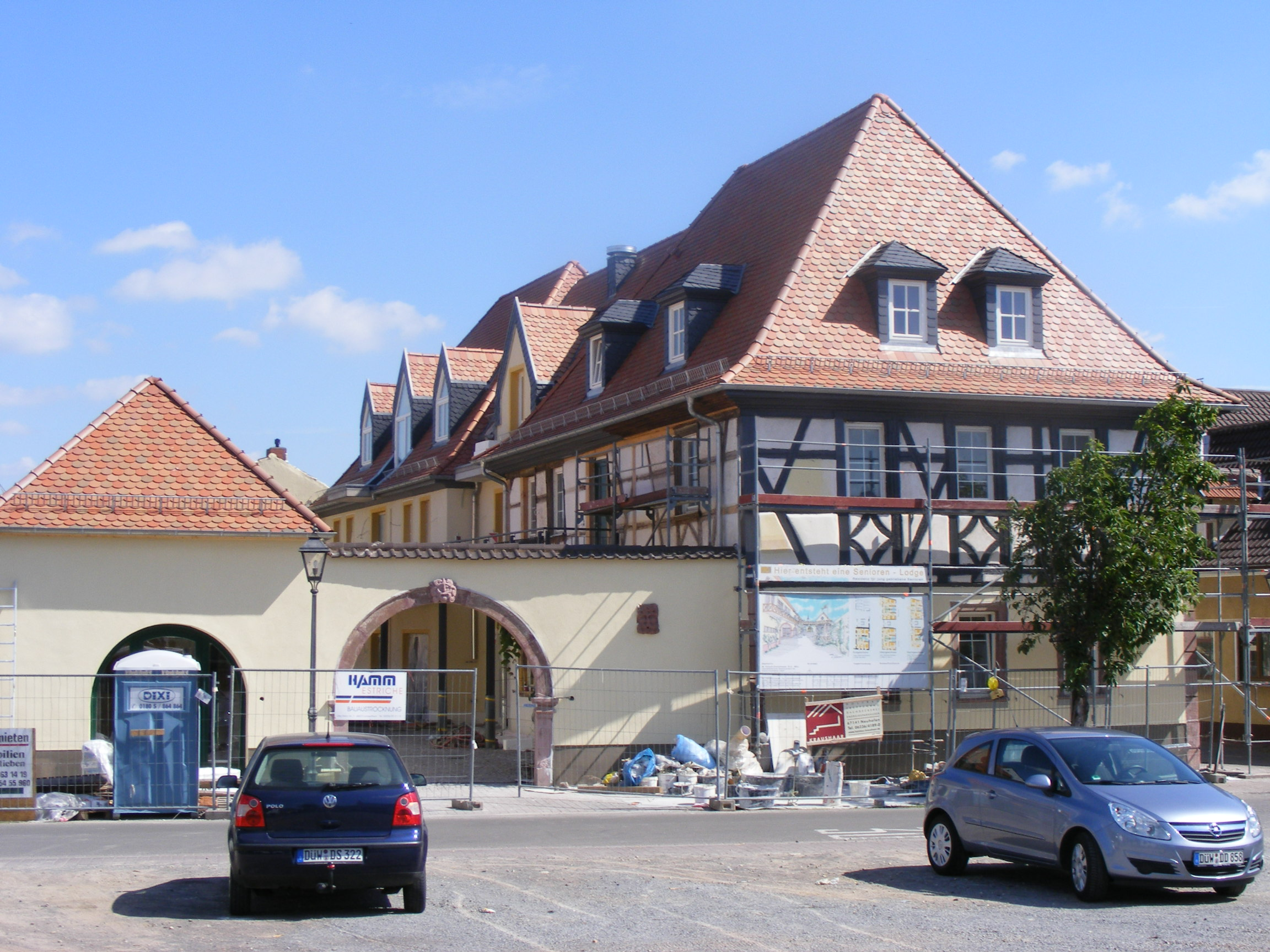 Kulturdenkmal Franz Rothermels Haus in Dirmstein, Endphase der Restaurierung